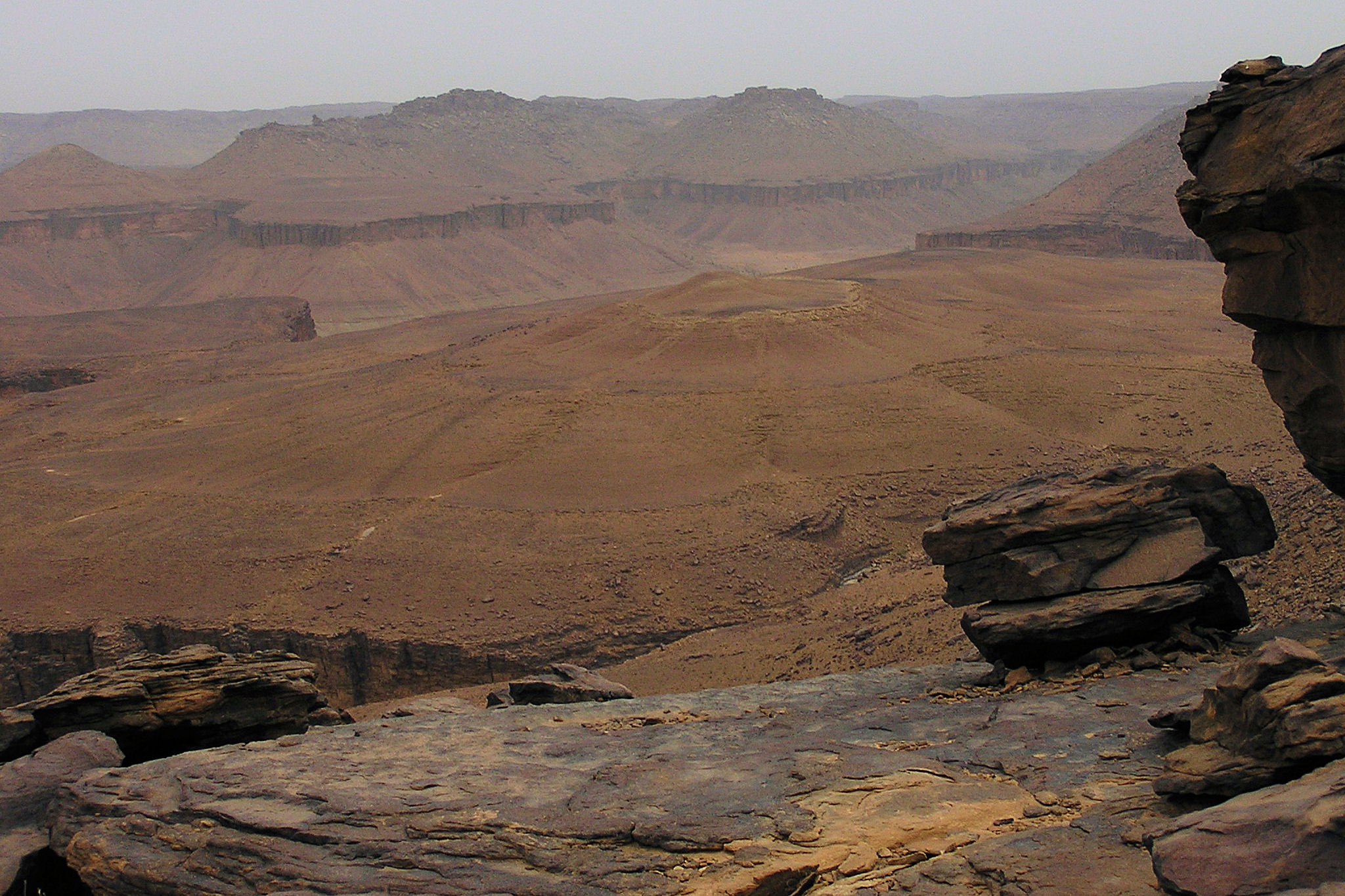 photo prise en janvier 2007 par Emmanuel Brunner (= Utilisateur:Manu25)